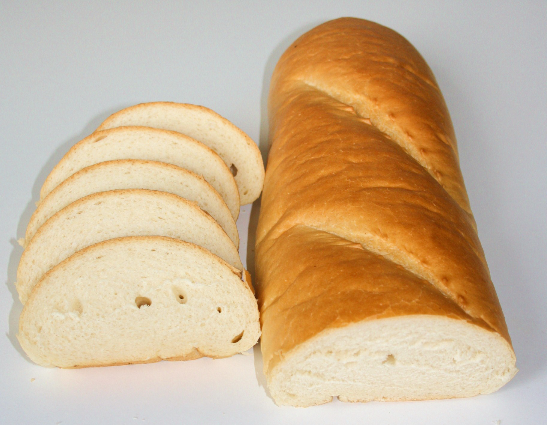 Veka